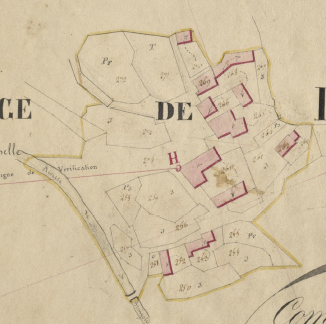 El poble de Brangolí, d'Enveig, en el Cadastre Napoleònic del 1812 (Arxius Departamentals dels Pirineus Orientals)